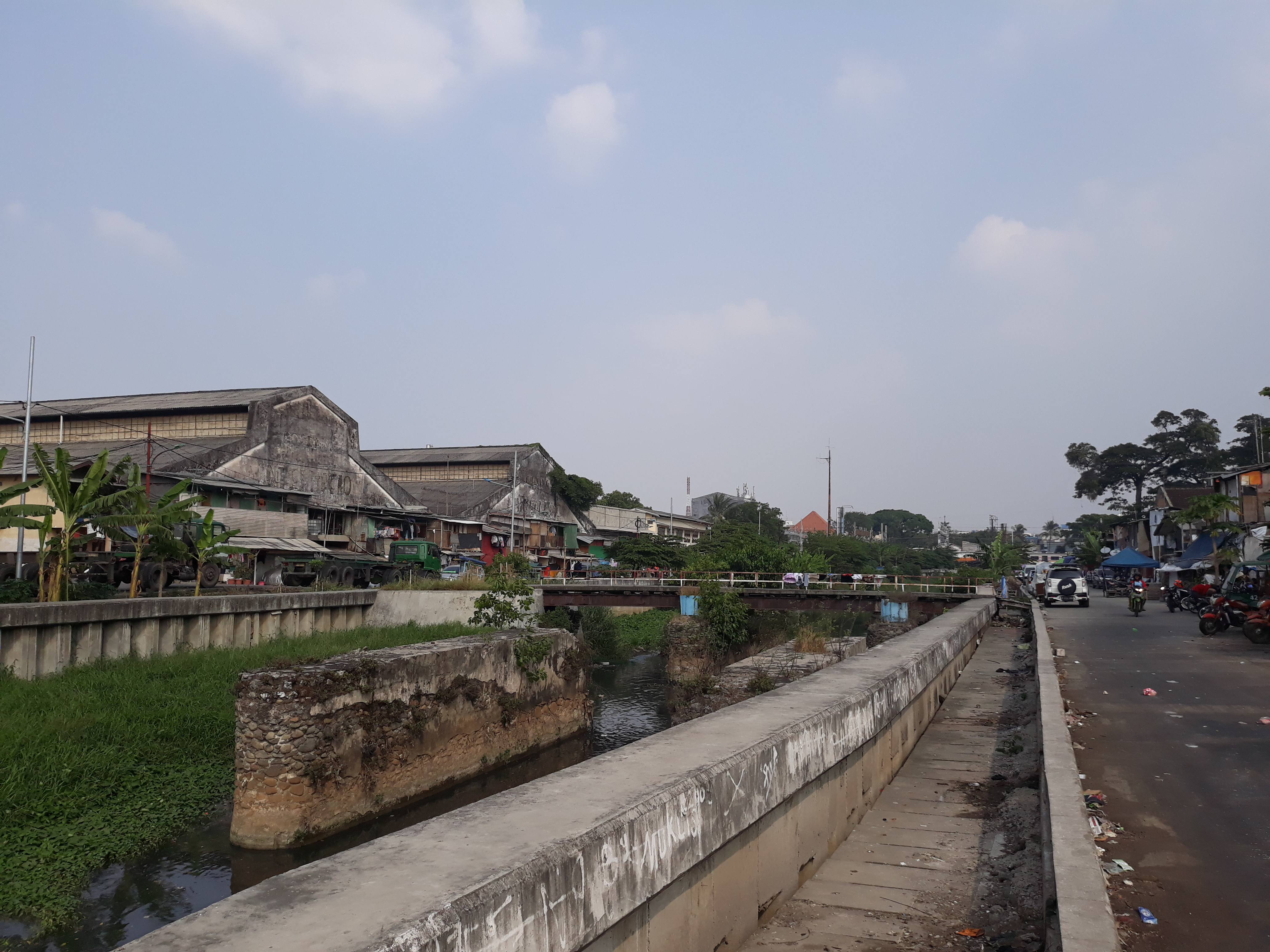 Salah satu sisa jalur lintasan kereta api Batavia Noord yang sekarang sudah digunakan untuk jembatan penyeberangan orang.